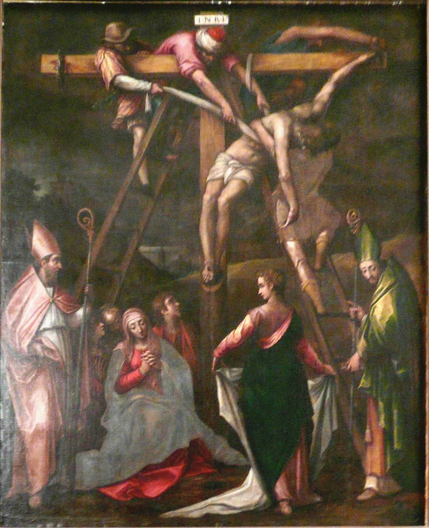 Une descente de croix .label QS:Lfr,"une descente de croix ."